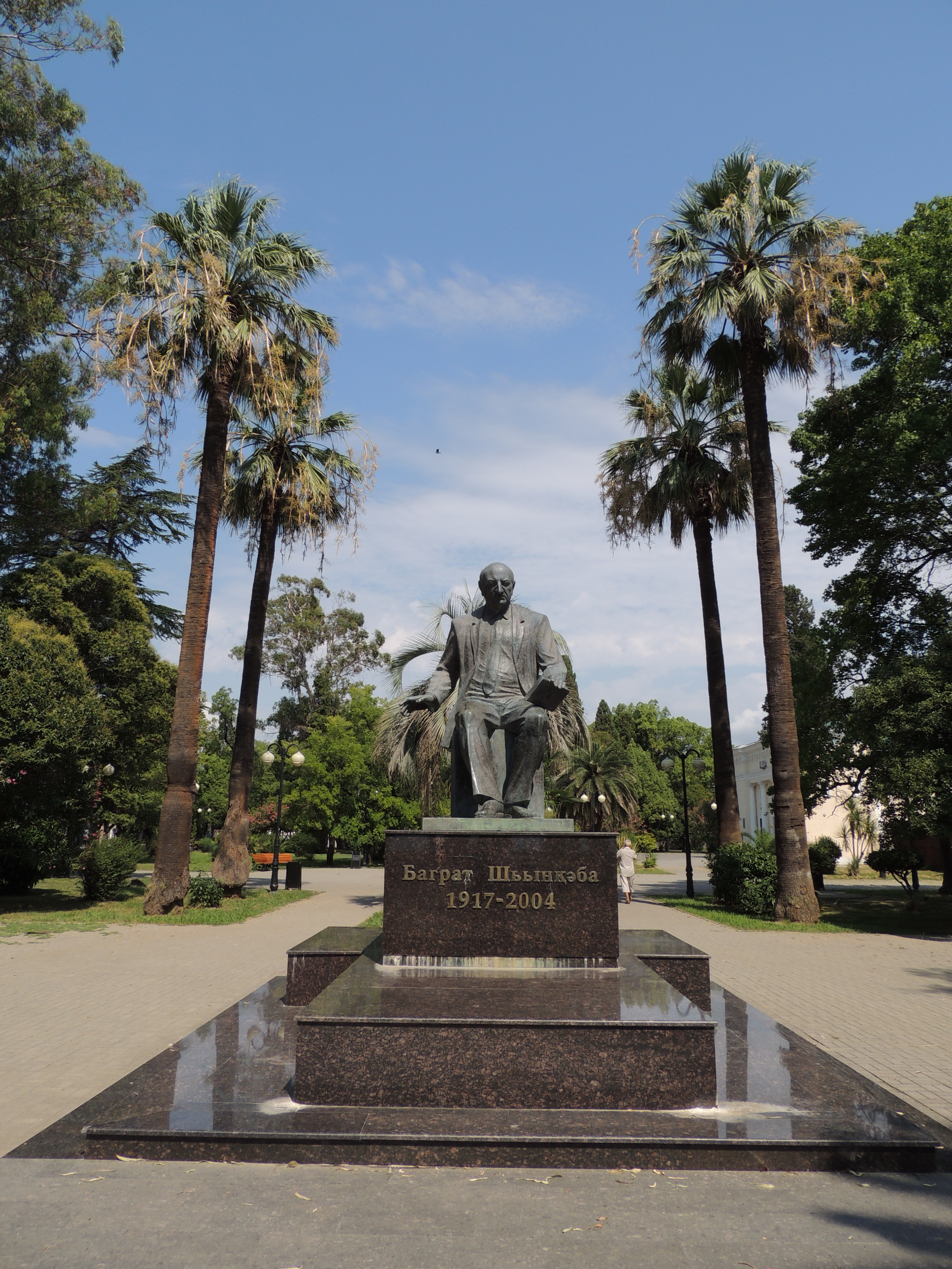 Памятник Баграту Шинкубе в Сухуме